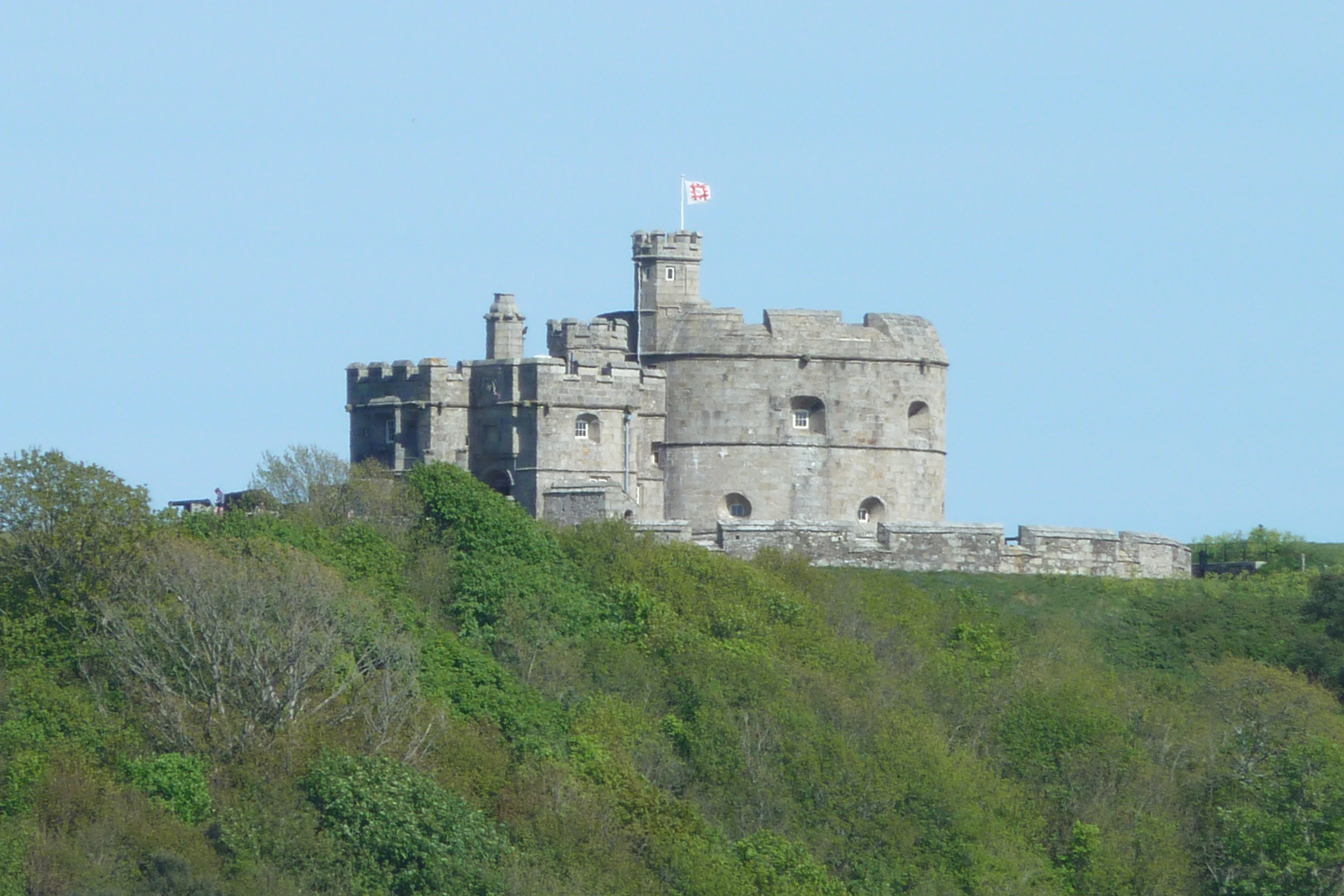 Pendennis Castle